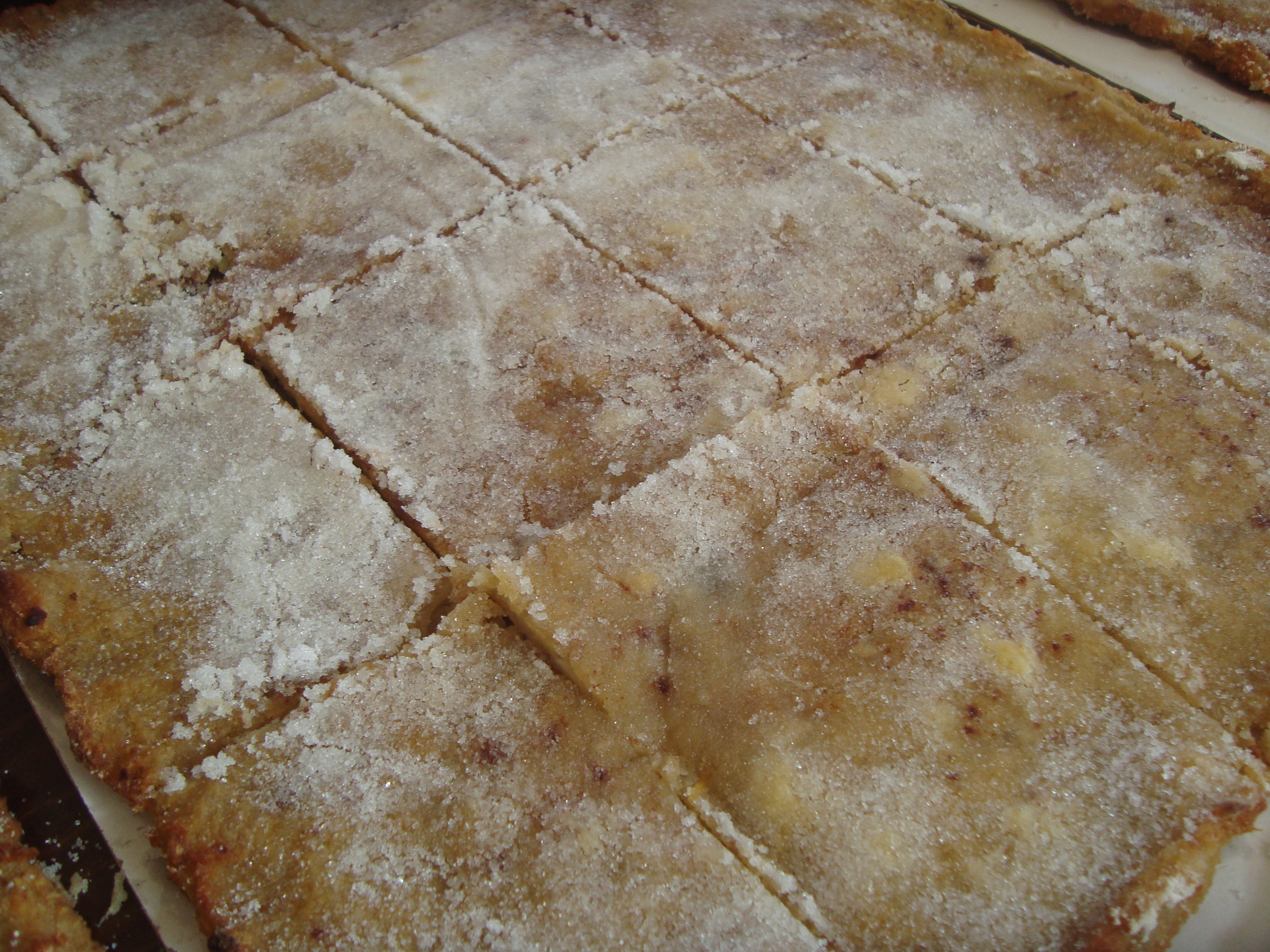 La coca de moniato és un dolç tradicional i senzill de la dieta mediterrània. Ingredients: 1 kg de moniatos, 200 gr. farina, sucre i oli d'oliva